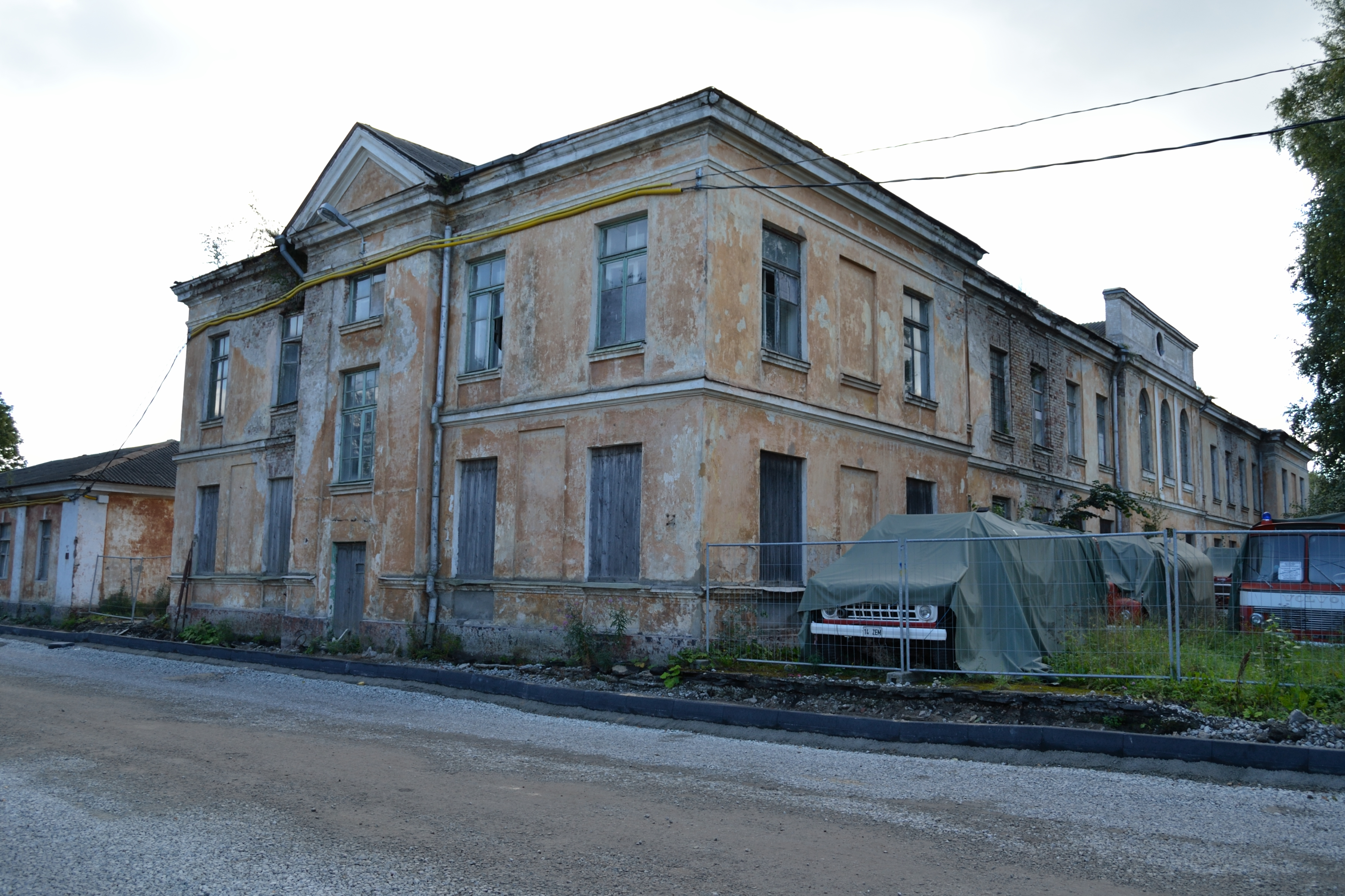 Tallinn, Lennusadama staabihoone ja kasarmuhoone Küti tn 15a